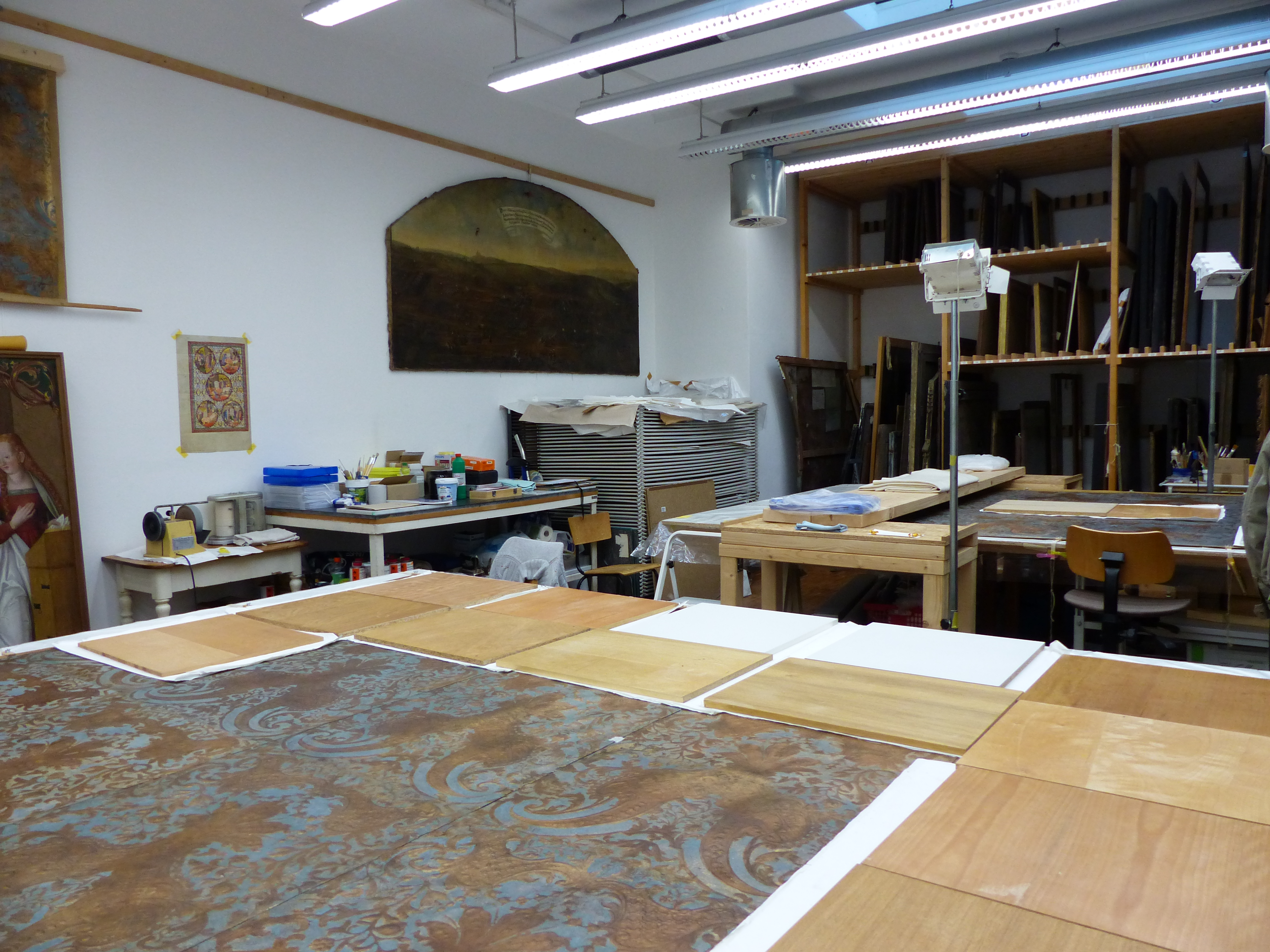 Referat Restaurierung im Landesamt für Denkmalpflege Sachsen, Dresden